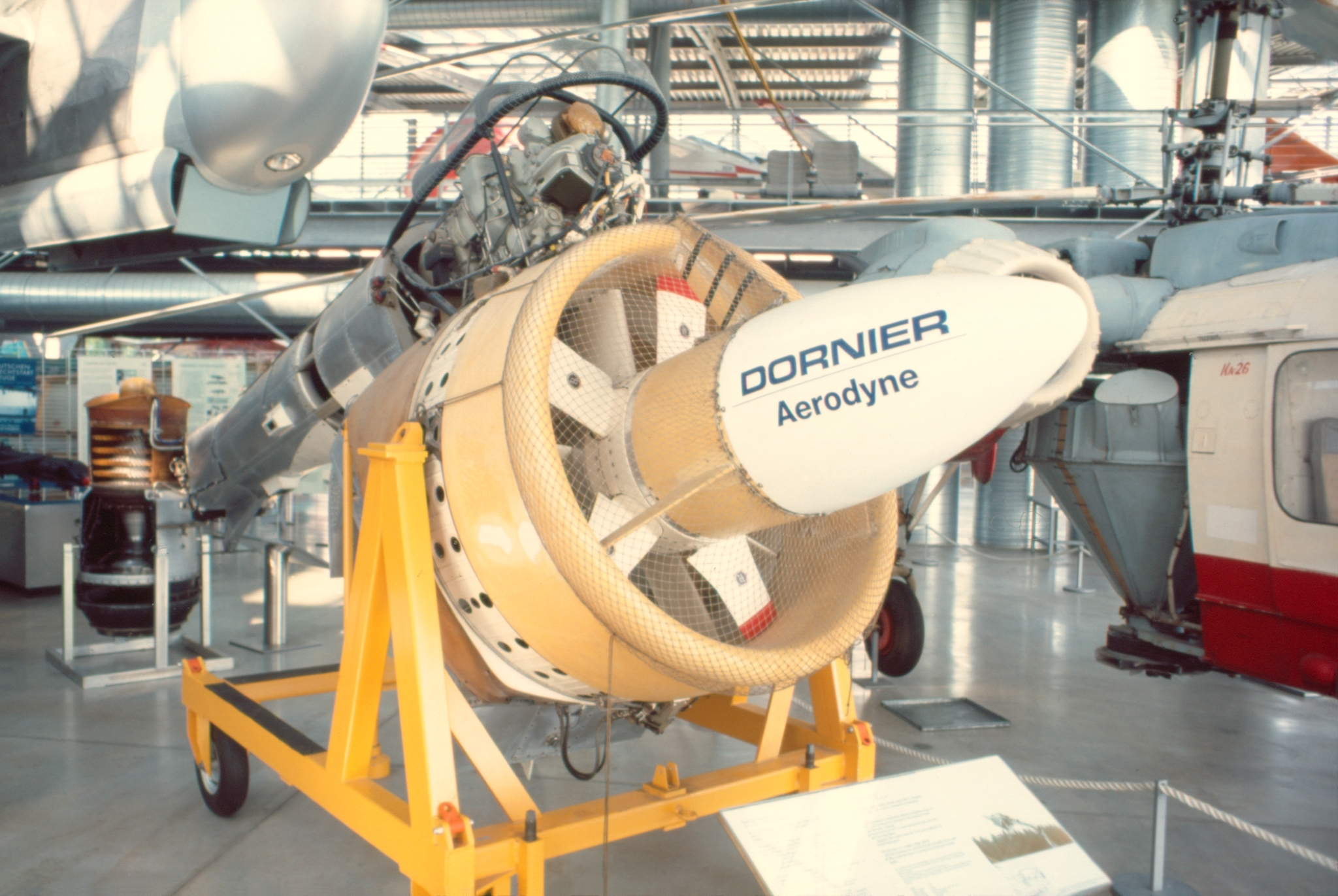 Unbemannte Drohne Dornier Aerodyne E1 auf dem Transportgestell. Ausgestellt im Deutschen Museum München, Flugwerft Schleißheim.